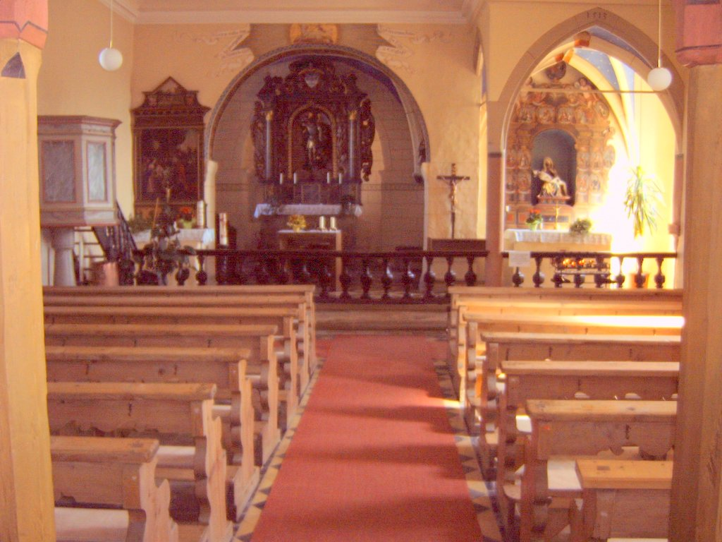 Innenraum der Michaelskapelle